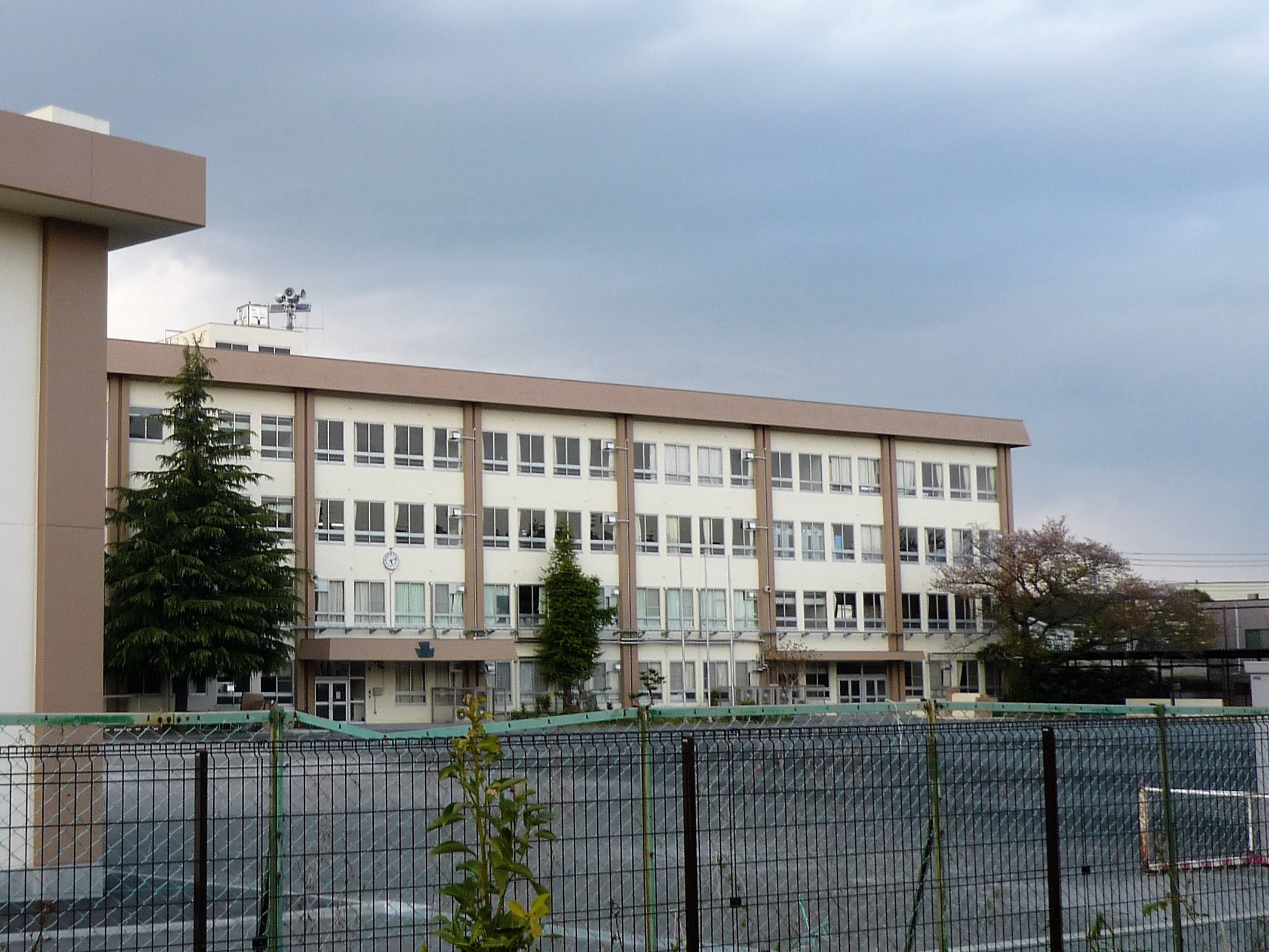 稲城市立稲城第一中学校（南西側より）